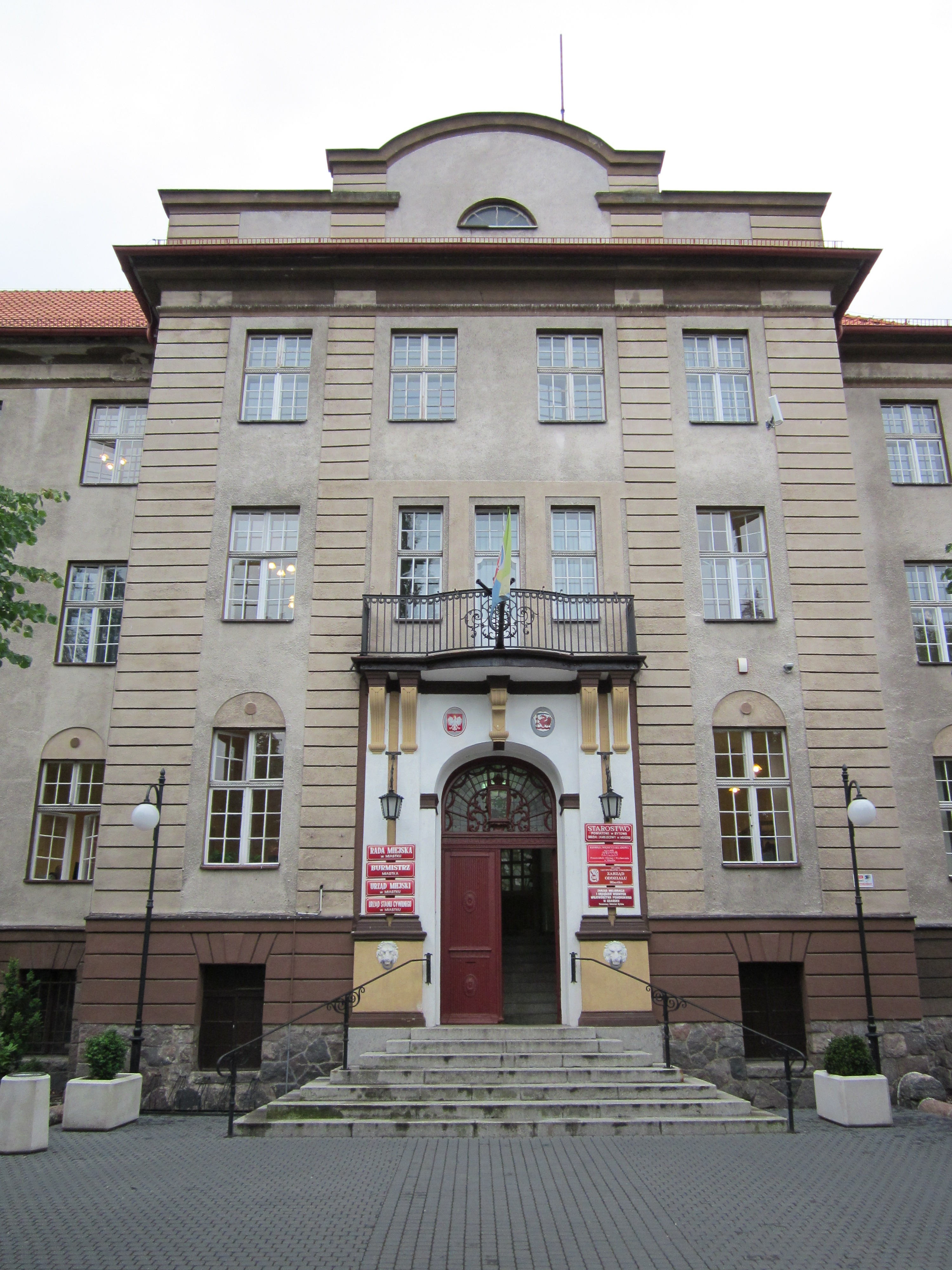 Budynek ten znajduje się przy ul. Grunwaldzkiej 1